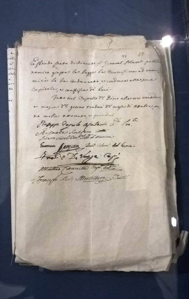 Copia originale della condanna a morte di Gioacchino Murat conservata presso l'Archivio Storico di Napoli.